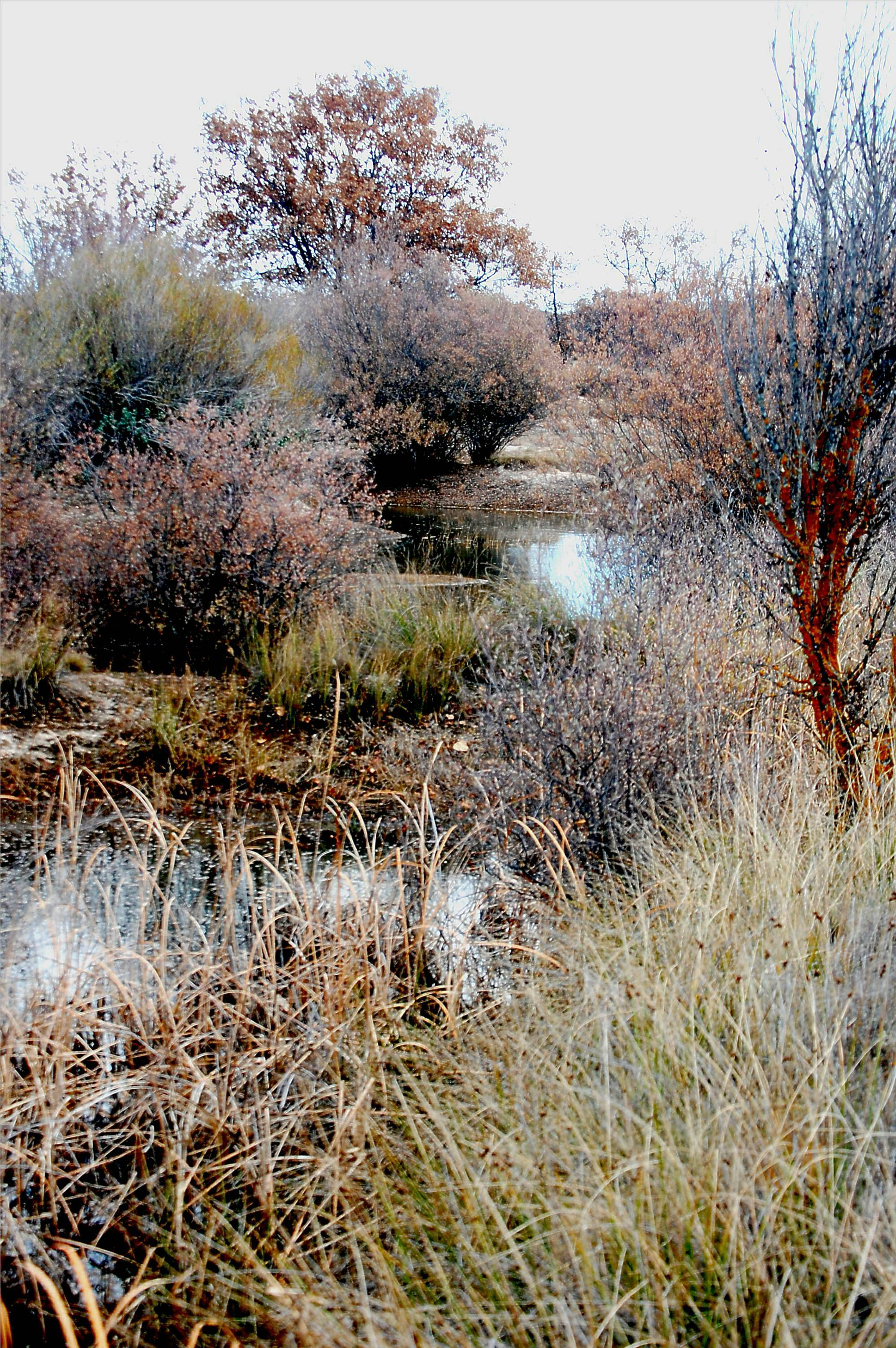 Vista del rebollar de Navalpotro, espacio natural (LIC), provincia de Guadalajara, España.